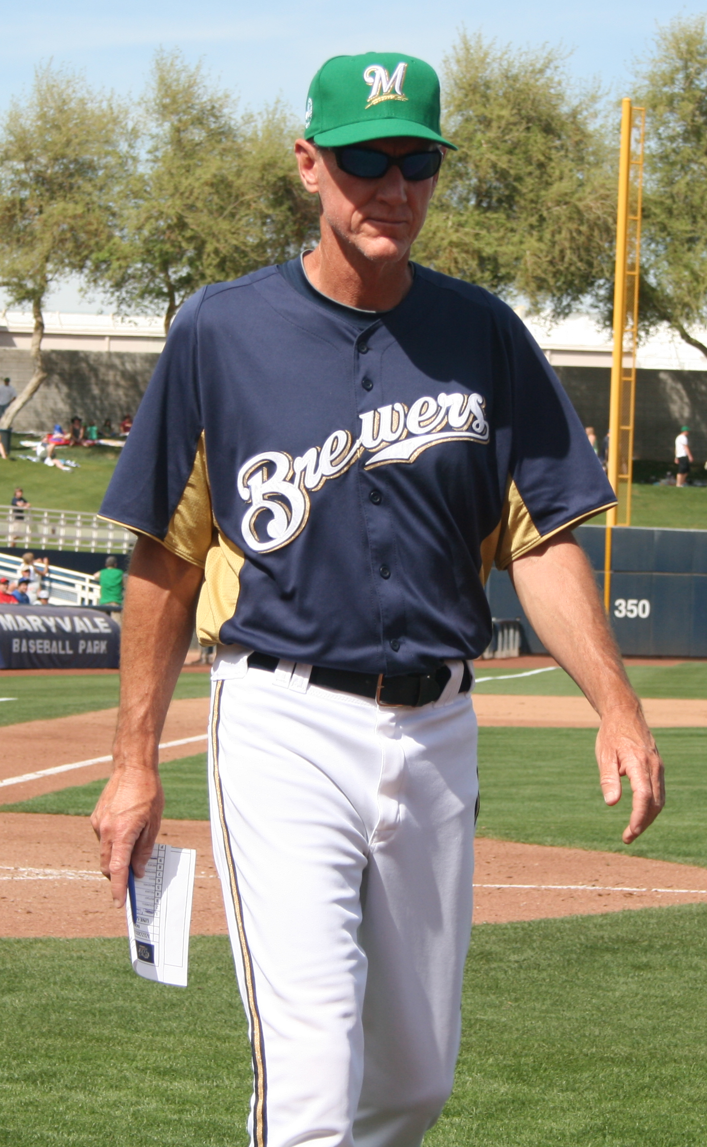 Ron Roenicke